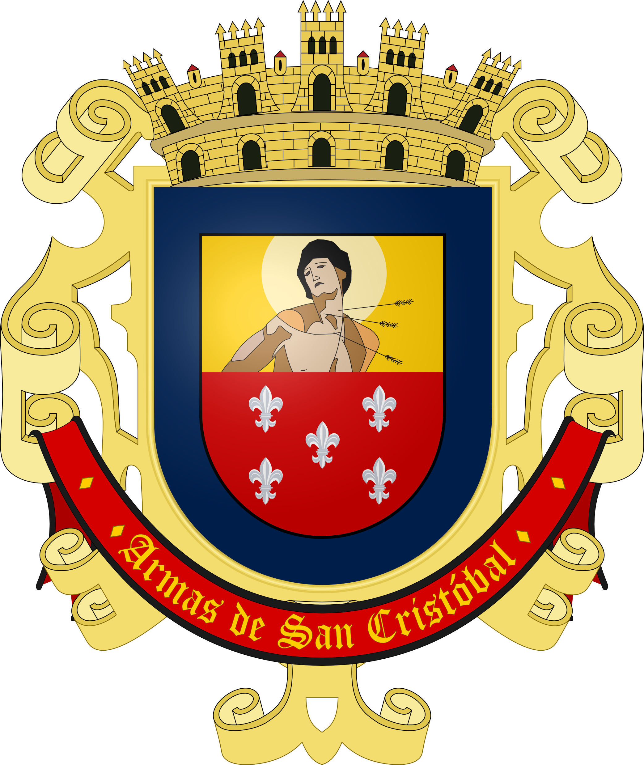 Escudo de armas de la ciudad de San Cristóbal Art. 1º- Se adopta como Escudo Oficial de Armas de la ciudad el mencionado proyecto, cuya composición es la siguiente: escudo cortado: en el primer cuartel y en campo de oro, la efigie en busto de San Sebastián, Patrono de la ciudad; en el segundo Cuartel y en campo de gules, cinco flores de lis de plata puestas en Sotuer, armas familiares del fundador Capitán Juan Maldonado; Bordura de Azur, y por timbre, una corona mural. Fuera del escudo y en su parte inferior, una cinta de gules, con la frase: “Armas de San Cristóbal”.